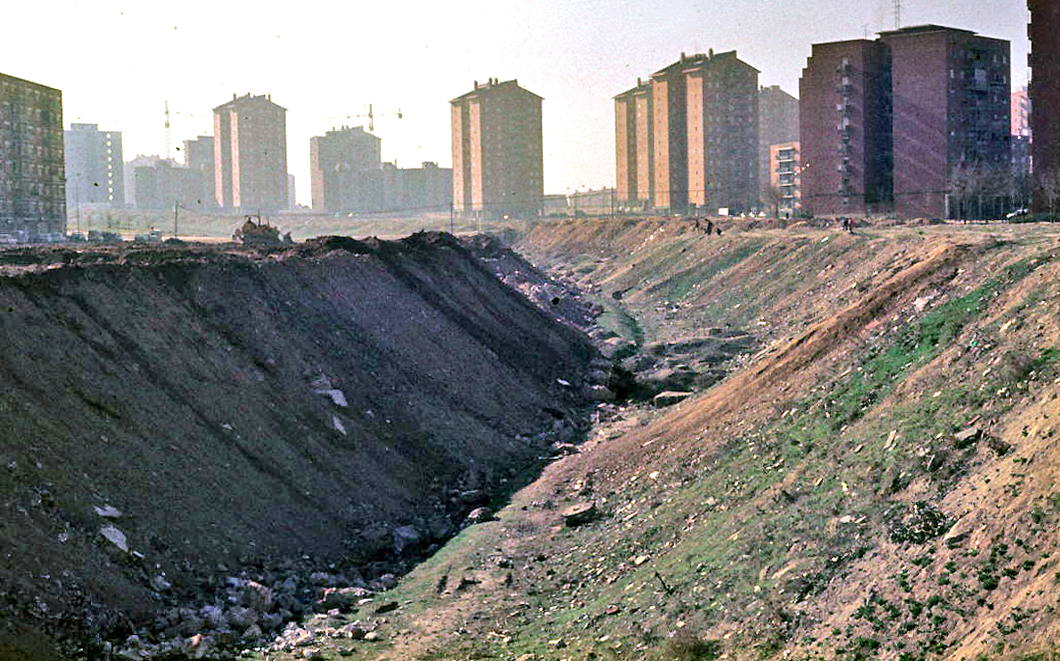 Relleno de la vaguada antes ocupada por el "tren de Arganda", en la zona de los jardines de Dionisio Ridruejo. Moratalaz (Madrid, España)